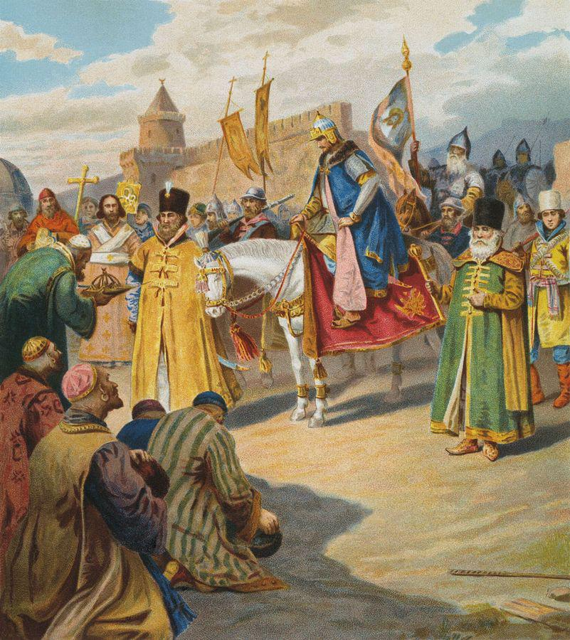 Коровин Пётр Иванович (1857—1919). Взятие Казани Иоанном Грозным. 1880-1890-е годы.